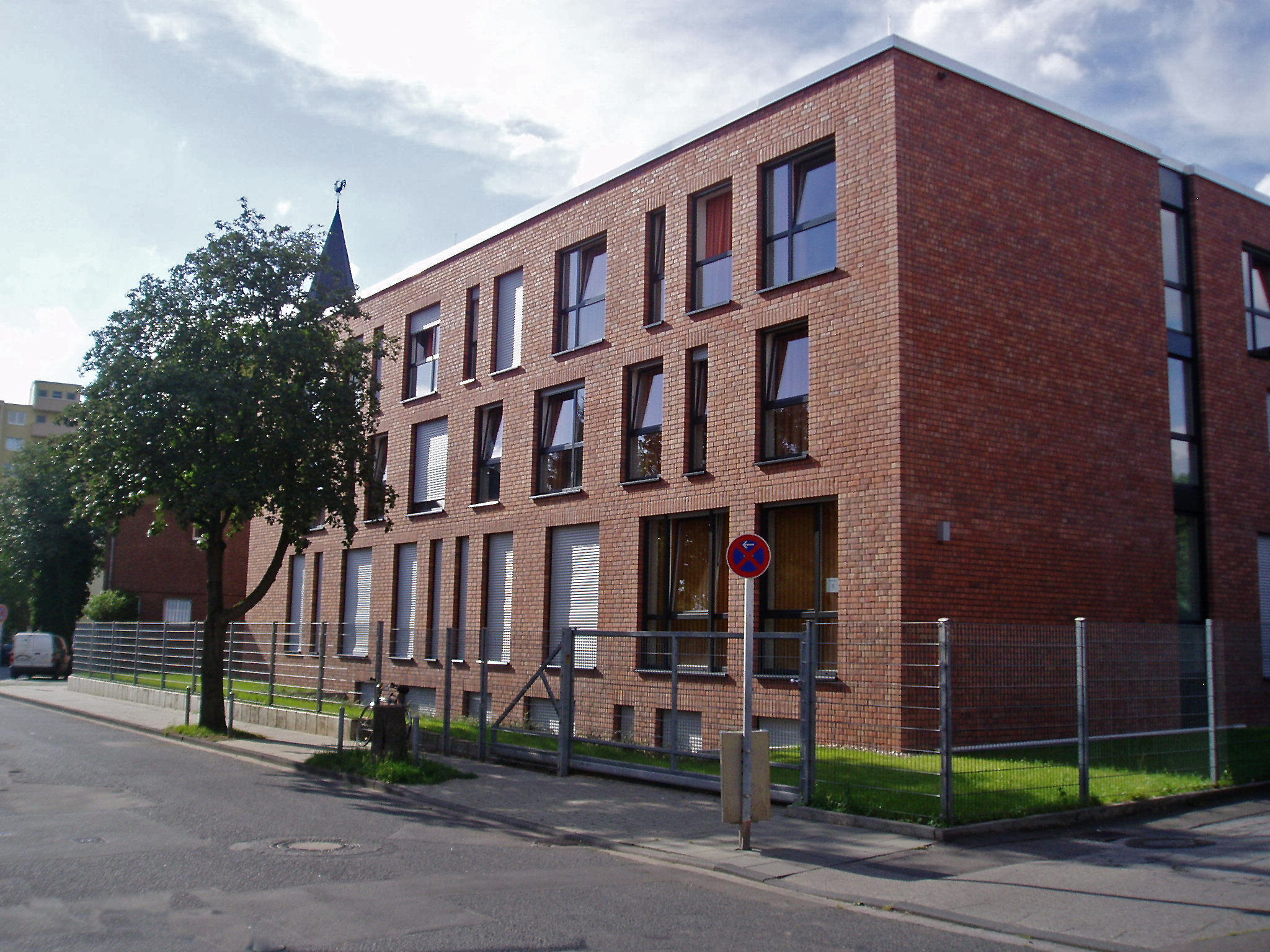 Das neu erbaute Jugendwohnheimheim St. Gereon in Köln-Höhenberg